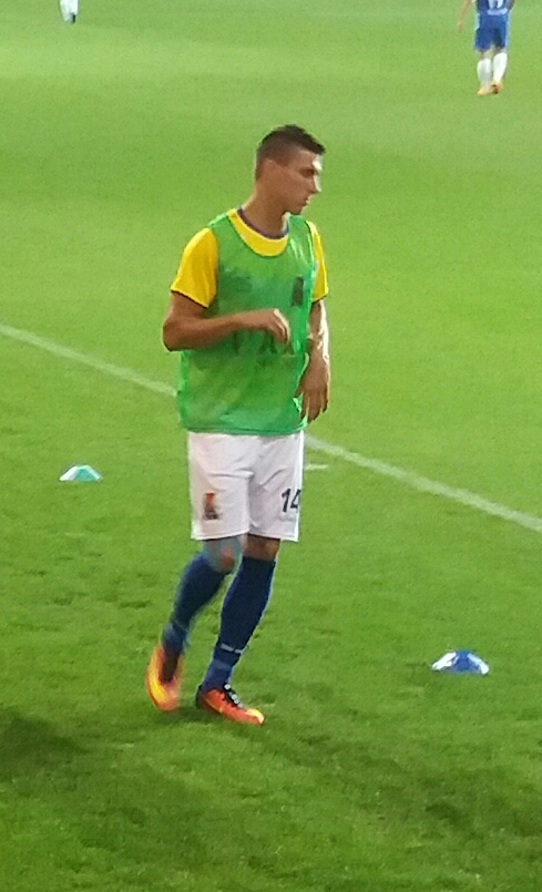 Damian Szpak - Motor Lublin (10 September 2016)